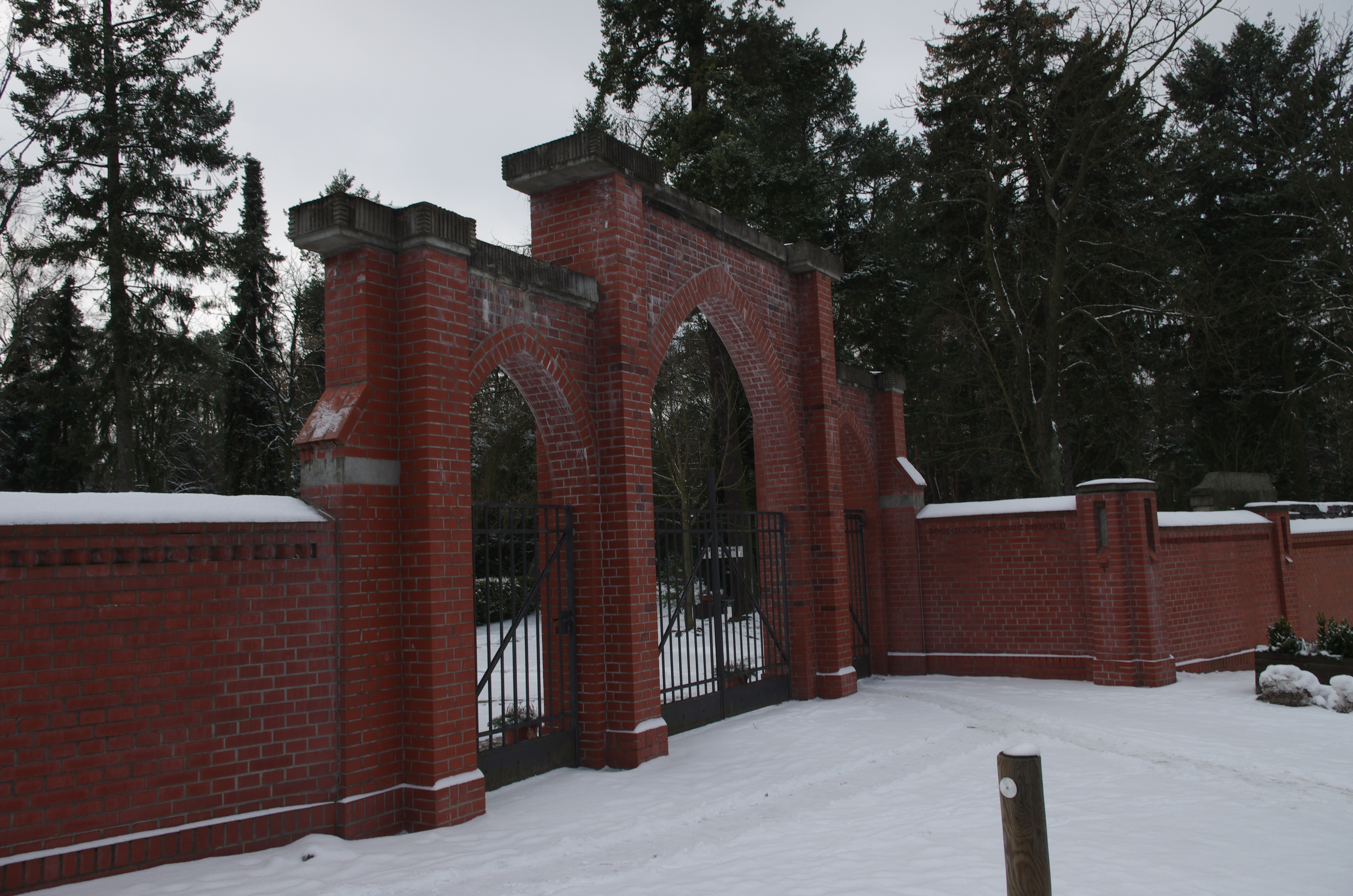 Wildau in Brandenburg. Der Eingang des Friedhofes steht unte Denkmalschutz.